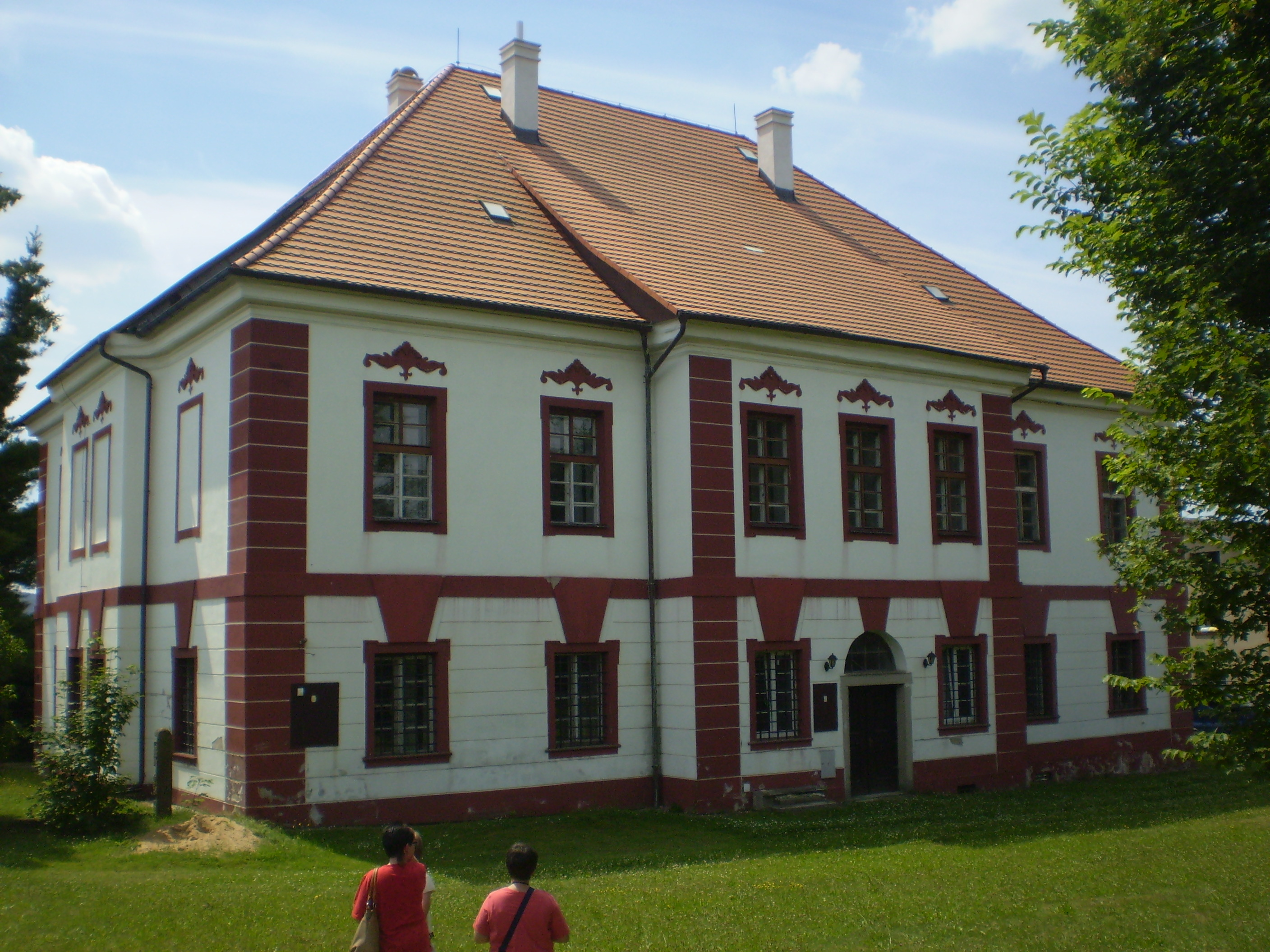 pohled z parku na zámek Vilémovice